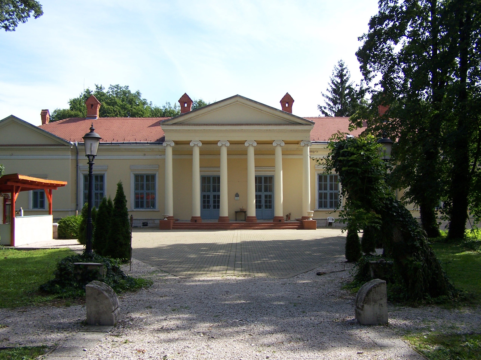 Podmaniczky-kastély (Verseg, Fenyőharasztipuszta) This is a photo of a monument in Hungary. Identifier: 7586